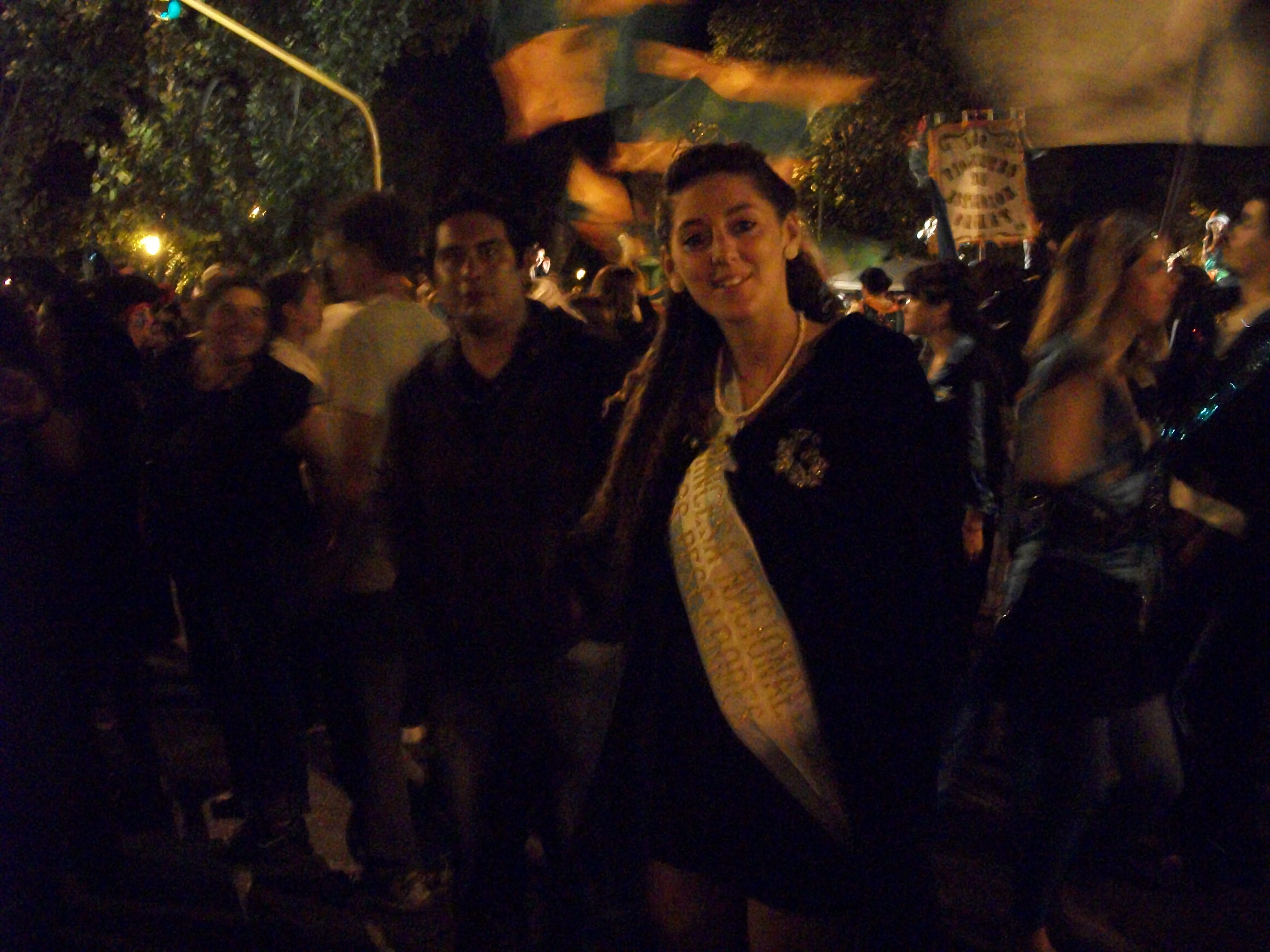 Reina Nacional de los Pescadores, Mar del Plata, Argentina